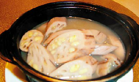 Jingtang Lotus Root's Usage